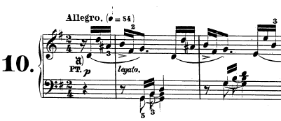 Compassos iniciais do primeiro movimento da Sonata Op. 14 número 2 de Beethoven